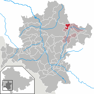 Rotterode in Thuringia - District Schmalkalden-Meiningen